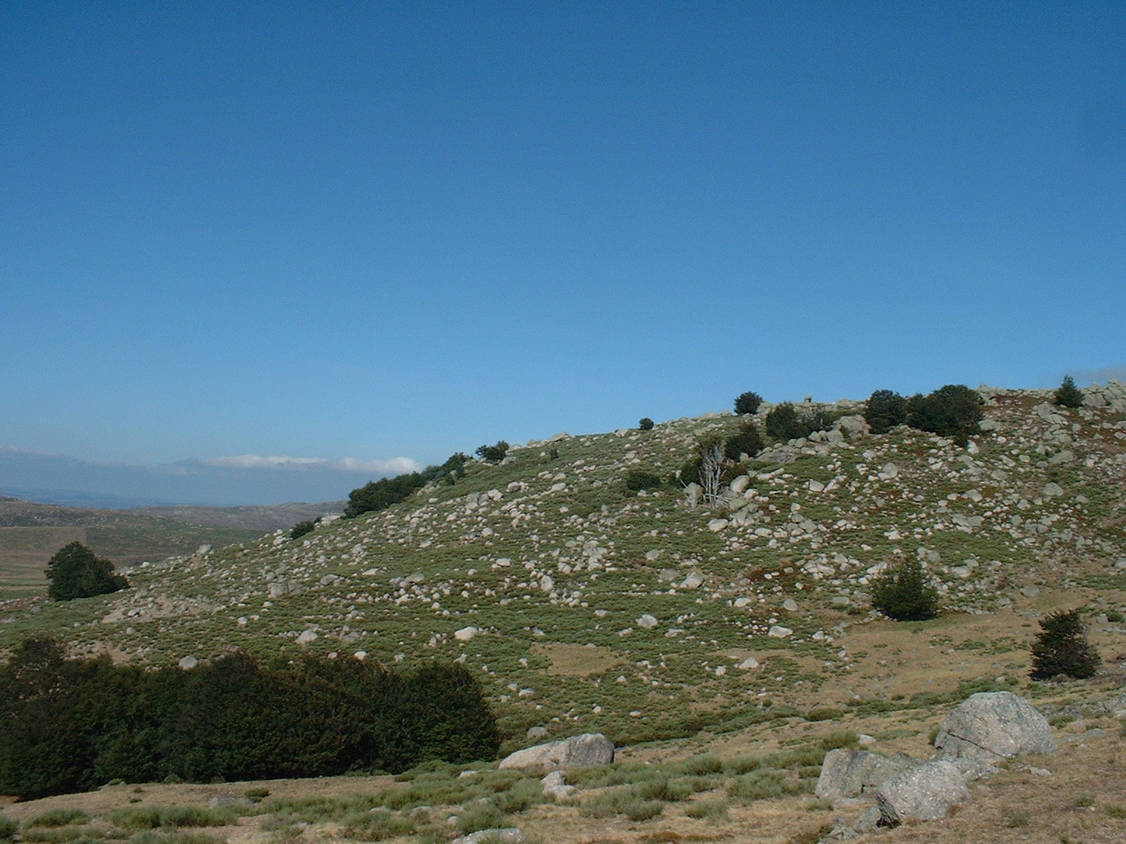 Paysage du mont Lozère